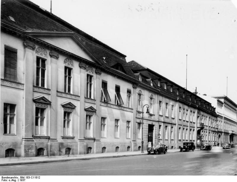 Zentralbild Berlin 1937 Das Auswärtige Amt in der Wilhelmstraße [Scherl Bilderdienst]